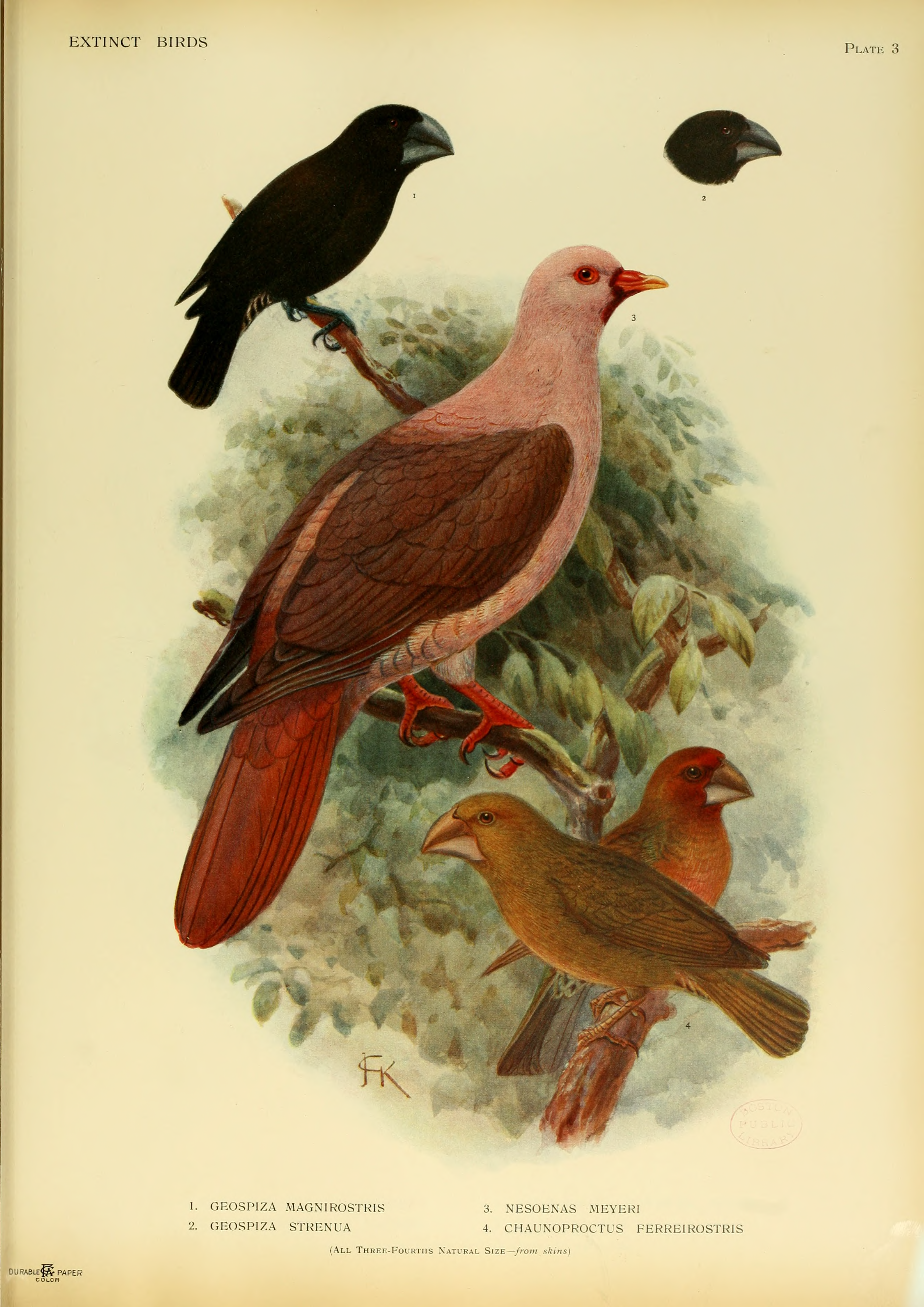 1. Geospiza magnirostris; 2. Geospiza strenua; 3. Nesoenas meyeri (=Nesoenas mayeri); 4. Chaunoproctus ferreirostris